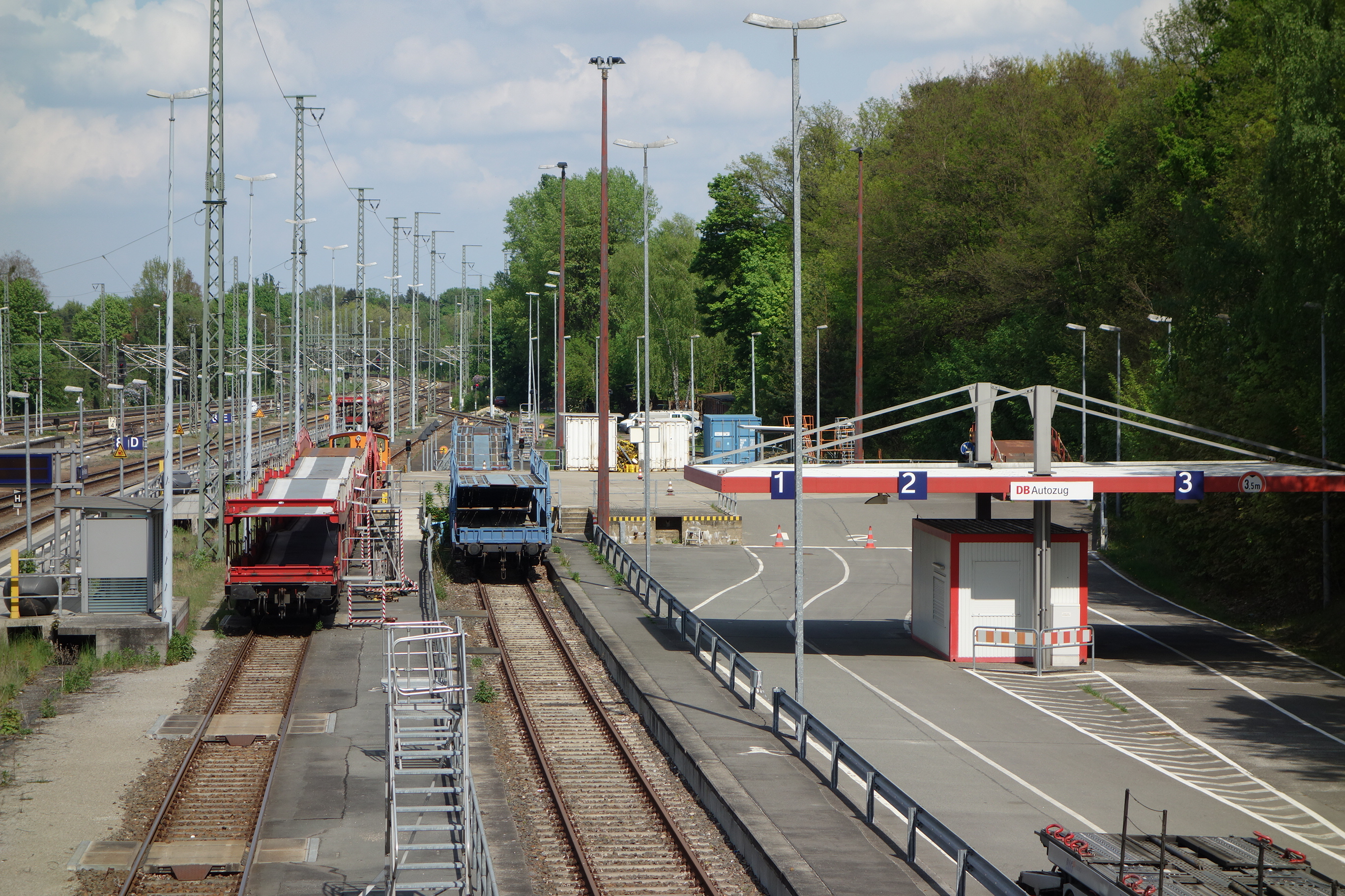 Autozug-Terminal Berlin-Wannsee, Gleisanlagen